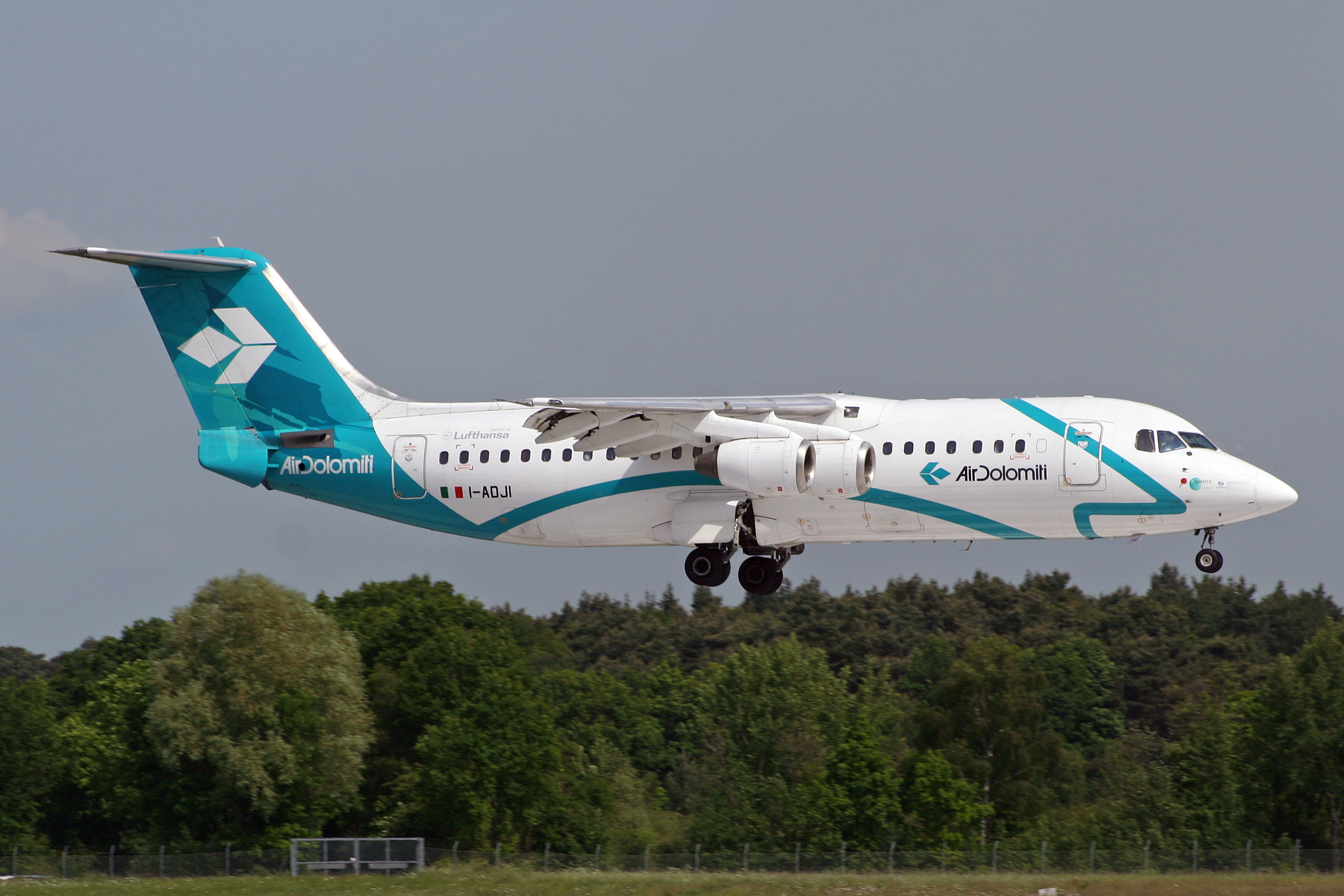 Haj / Eddv